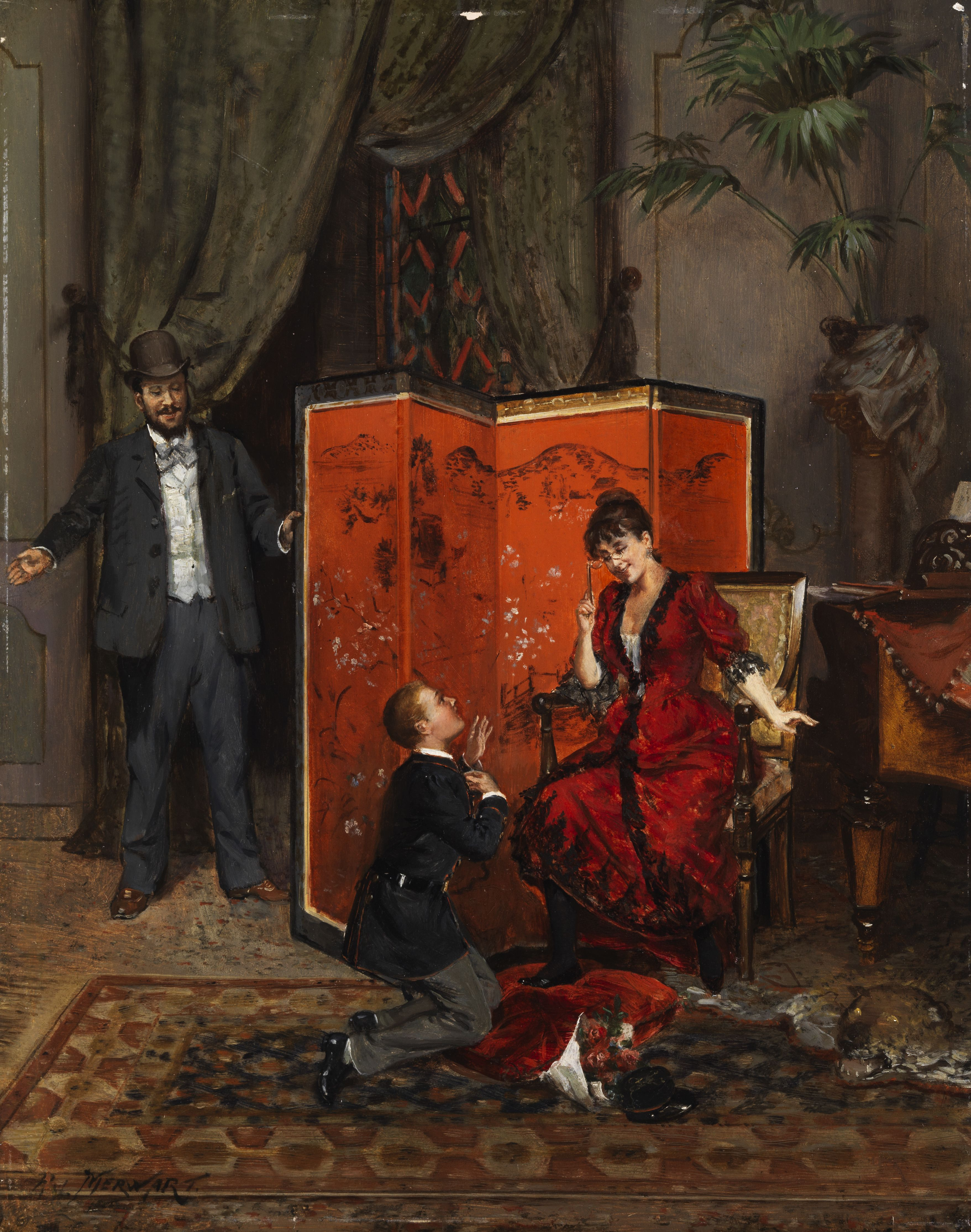 Der verfehlte Antrag.title QS:P1476,de:"Der verfehlte Antrag." label QS:Lde,"Der verfehlte Antrag."